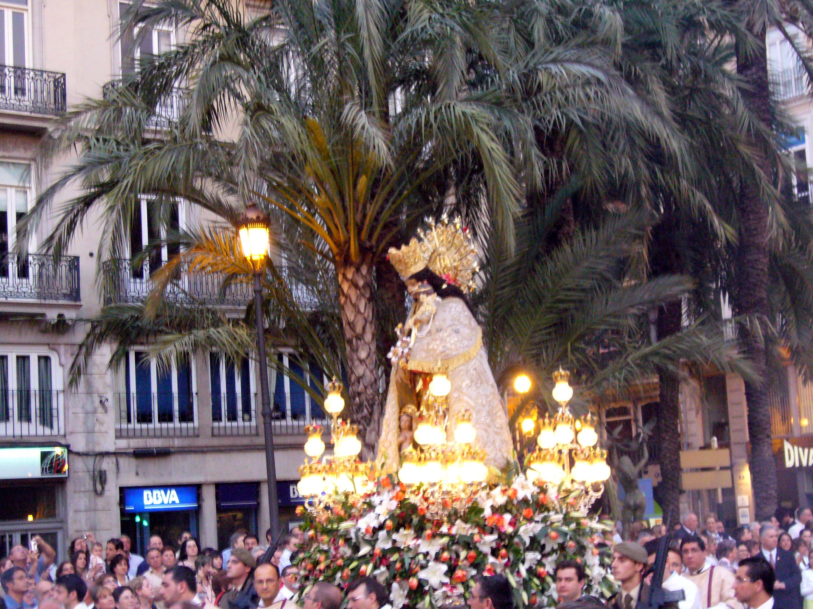 procesion Virgen de los Desamparados Valencia